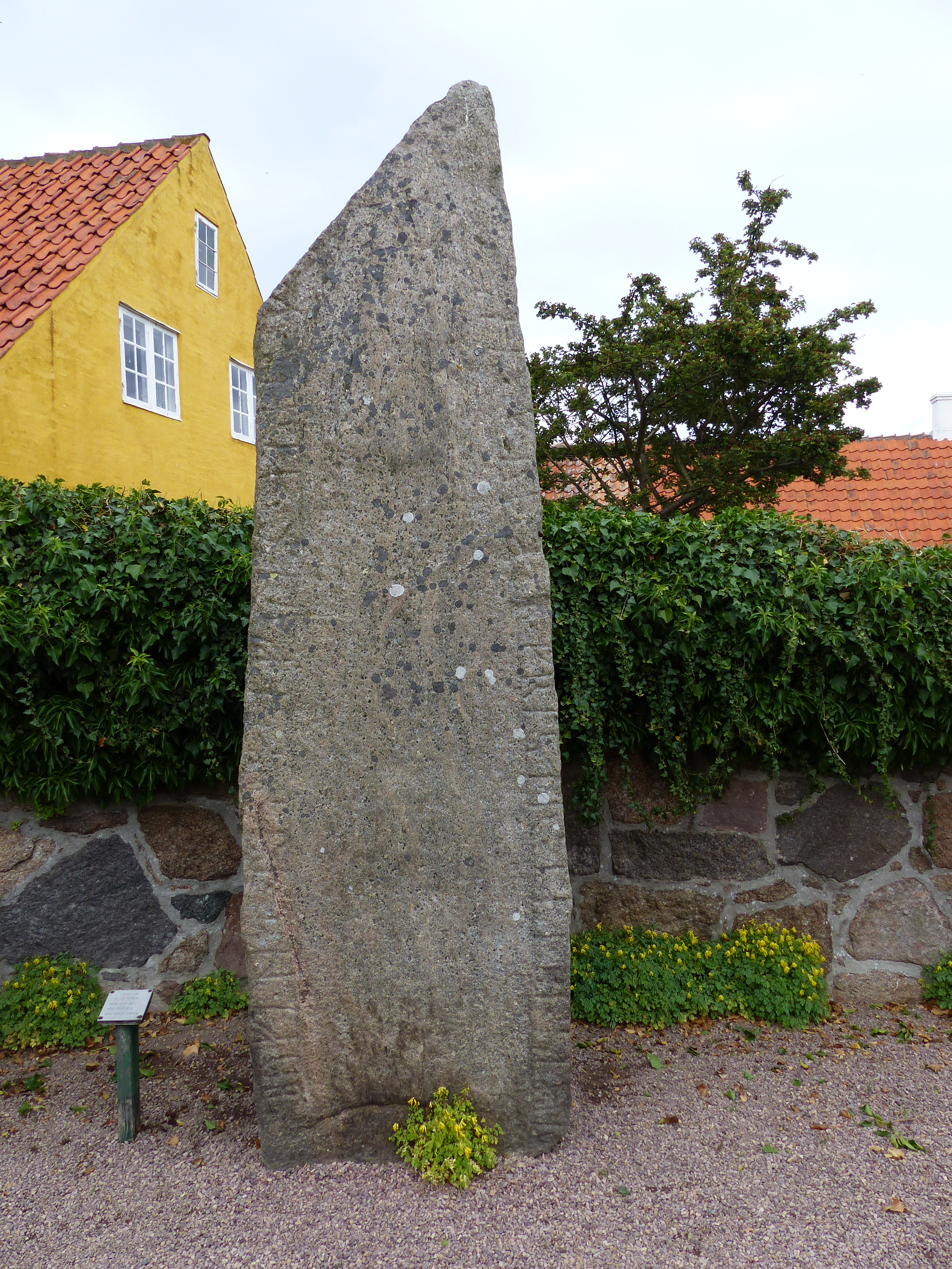 Bornholm, Svaneke Kirkegaard, Runesten ved kirkegårdsdiget umiddelbart vest for hovedindgangen